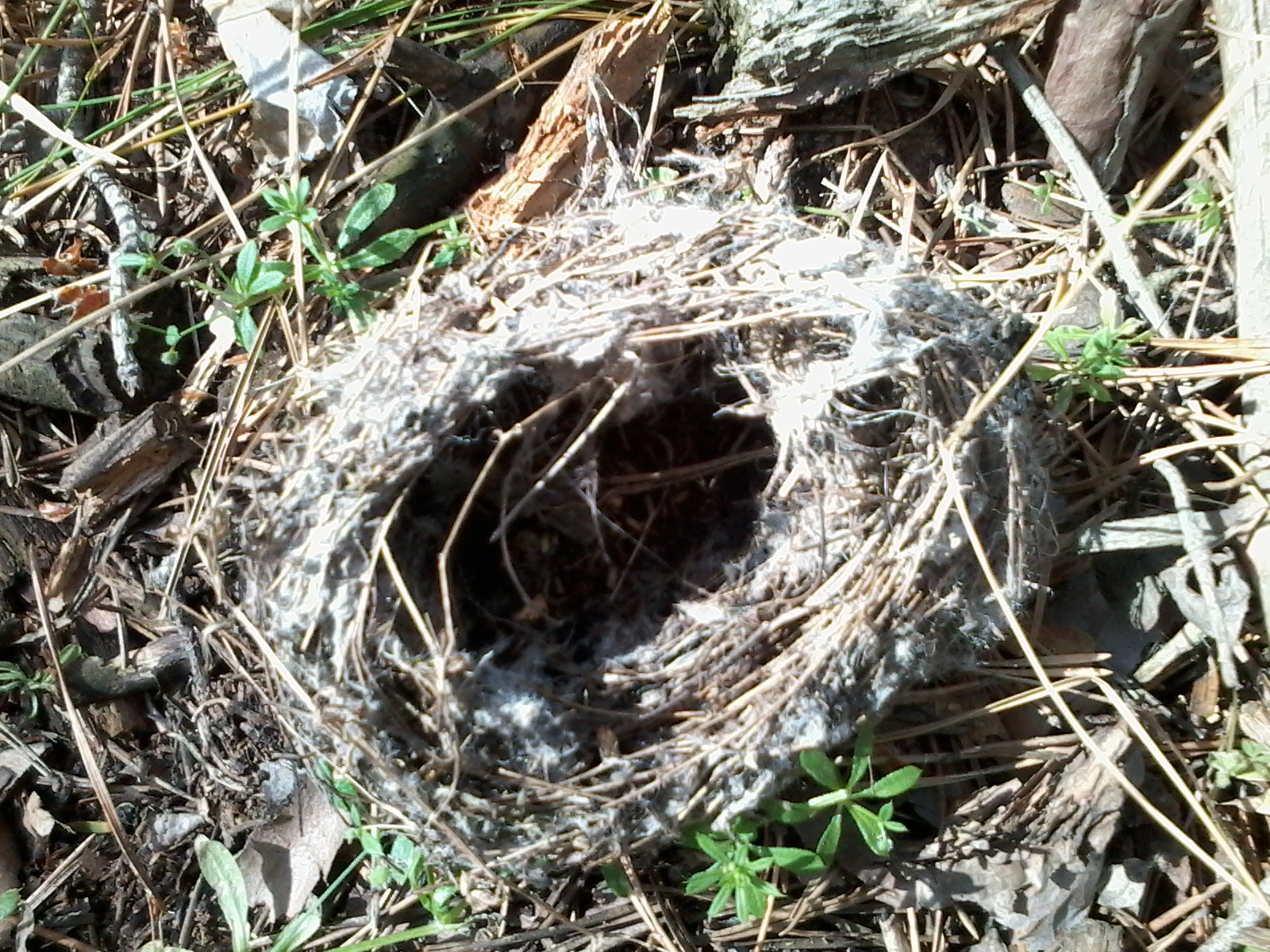 Сосновий ліс, Миколаївщина. Знято на смартфон.